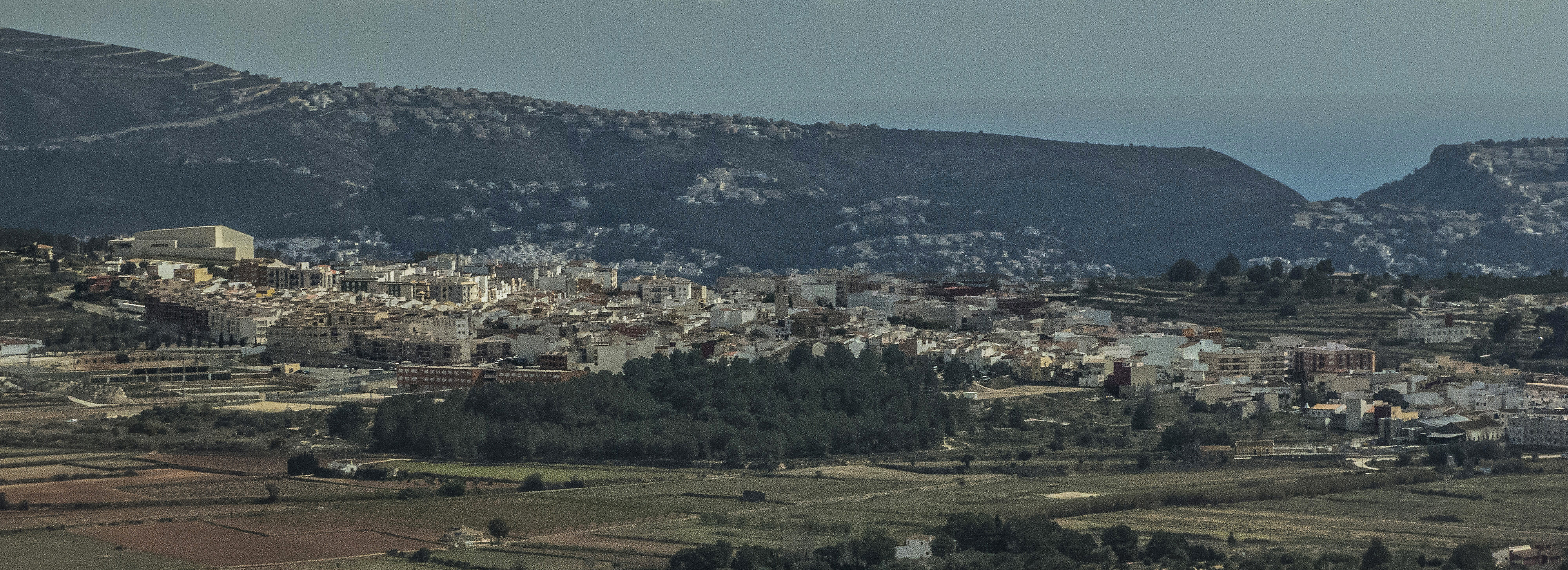 Panoràmica de Teulada -Marina Alta-. Foto feta des de la Vallada Verda de Benissa.